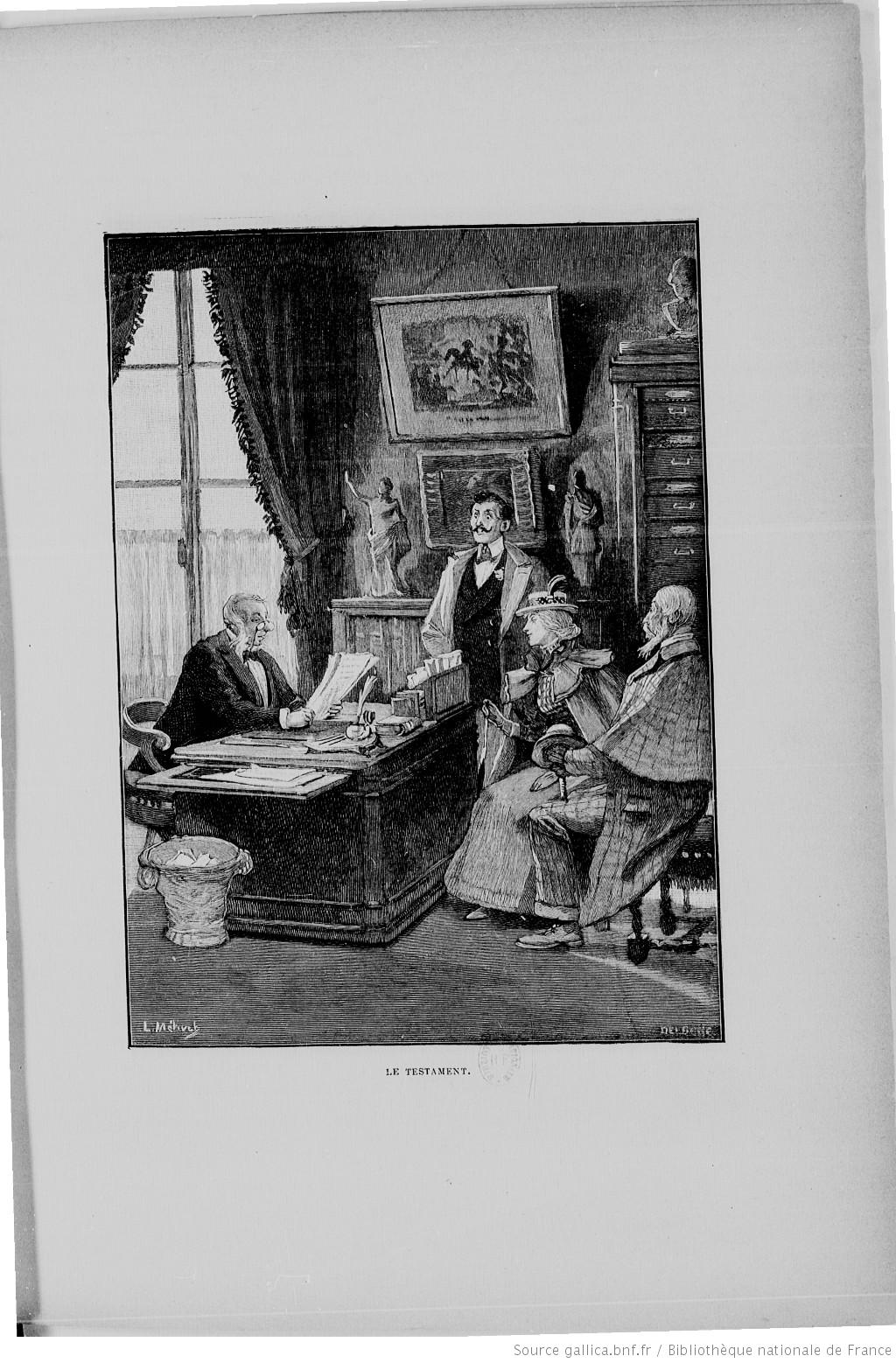 "Le Testament", gravure d'un dessin de Lucien Métivet illustrant le premier chapitre du roman de Paul d'Ivoi "Les Cinq Sous de Lavarède" (1894).